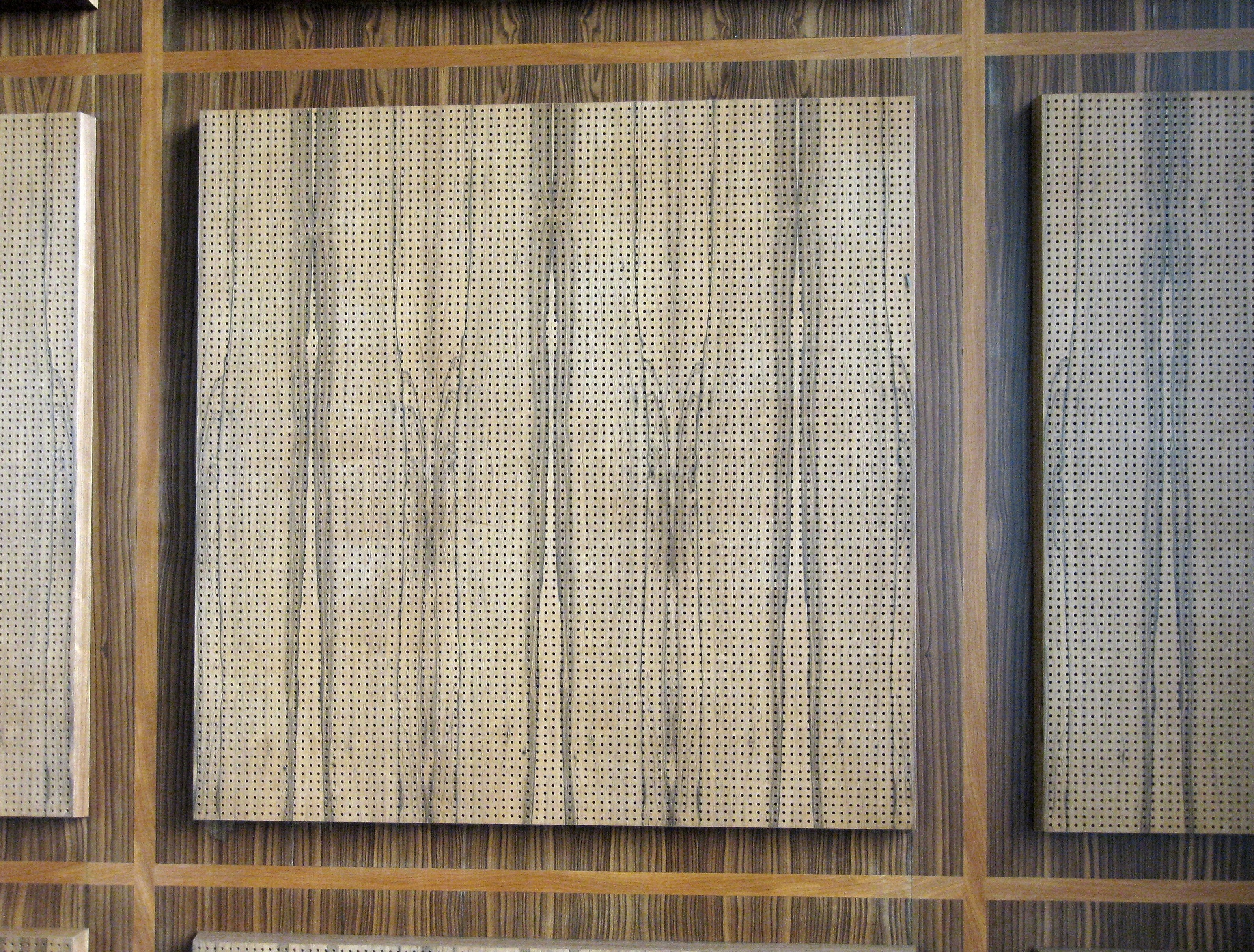 Saal der Bundespressekonferenz in Bonn, Tulpenfeld 7: Hölzerne Wandverkleidung